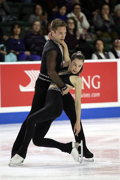 Эвелин Уолш и Треннт Мишо на этапе Гран-при Skate America 2018